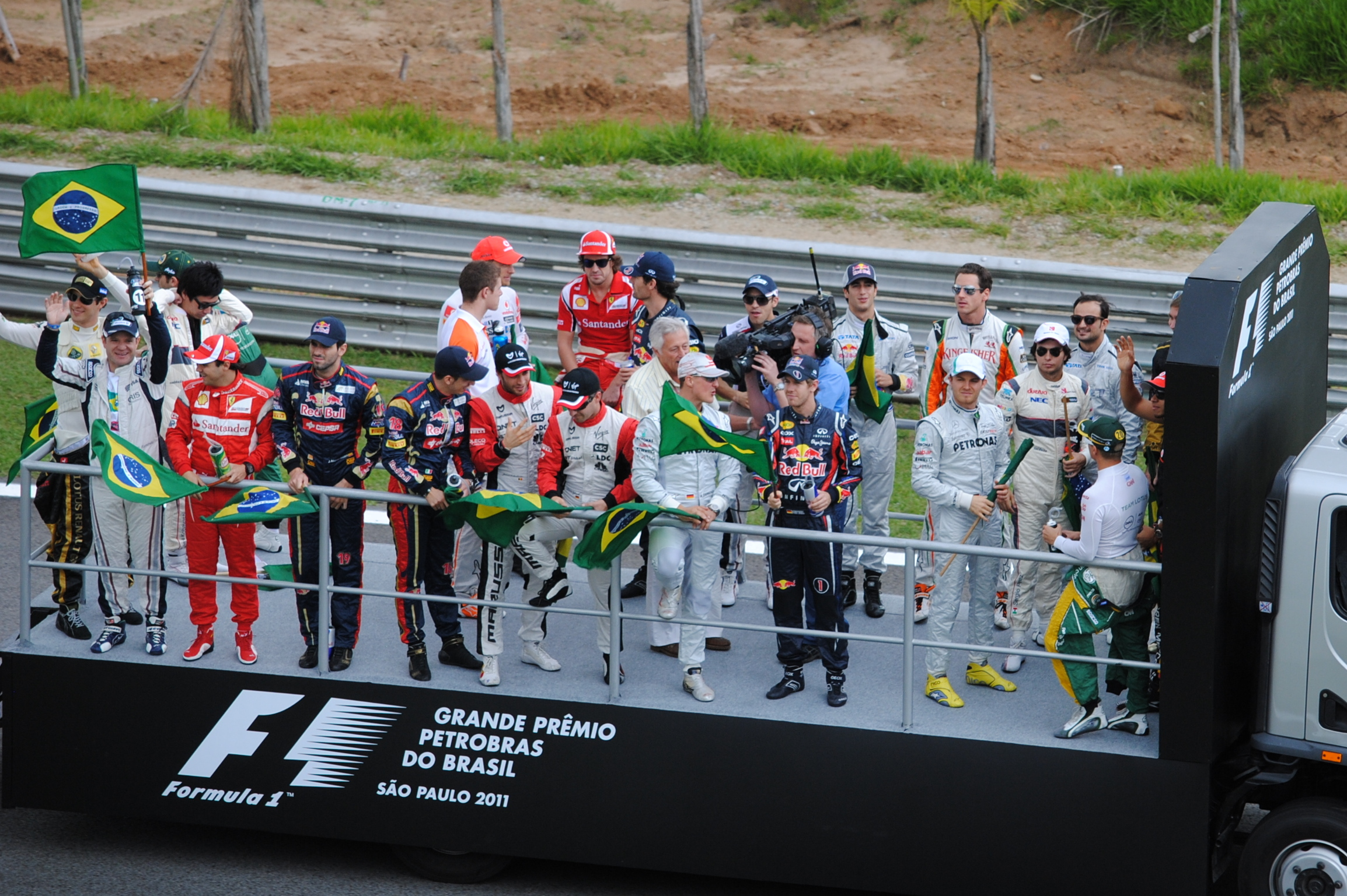 GP Brasil de Formula 1 - Interlagos, São Paulo.